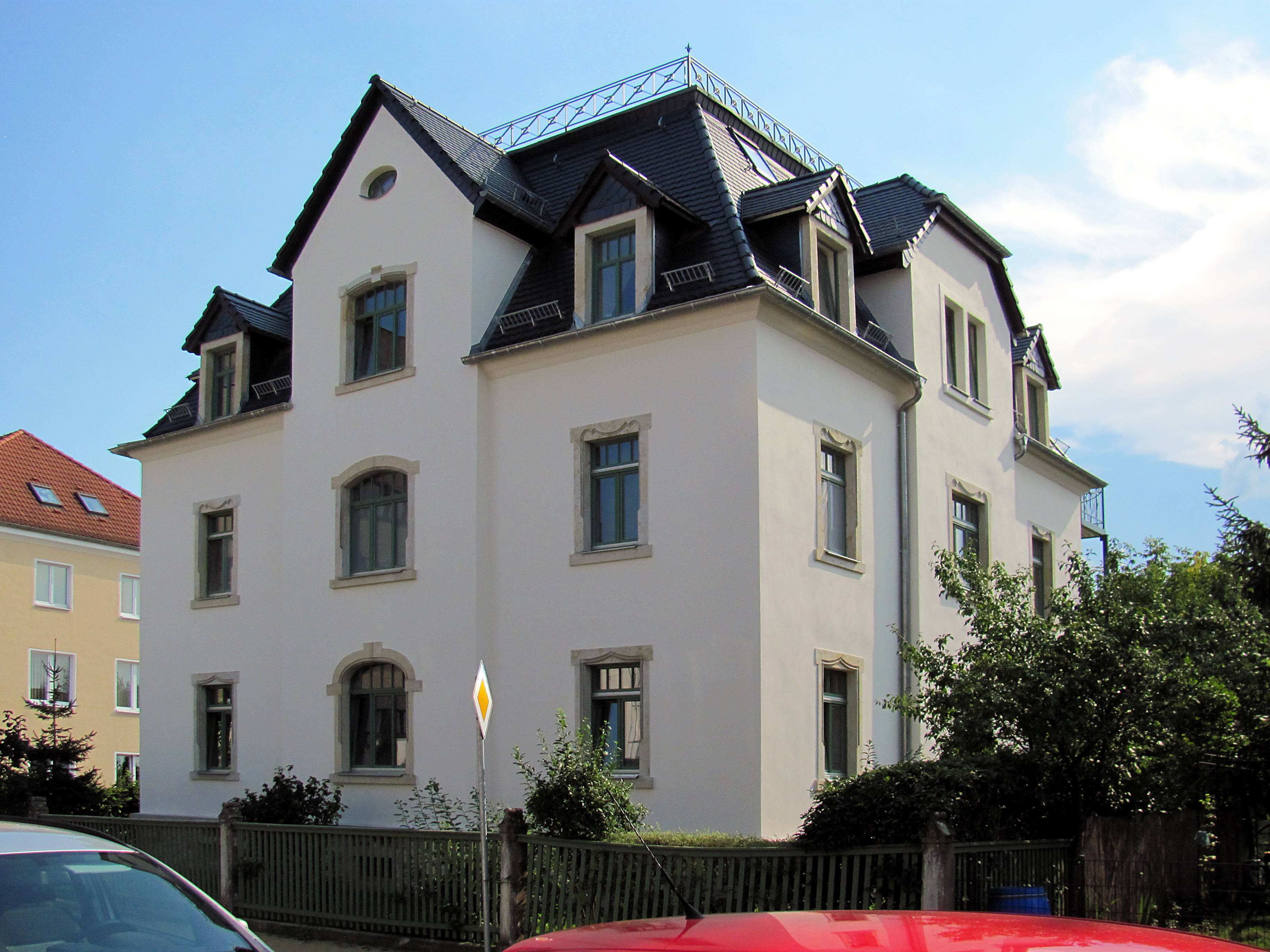 Radebeul (Gemarkung), Mietshaus Gartenstraße 61